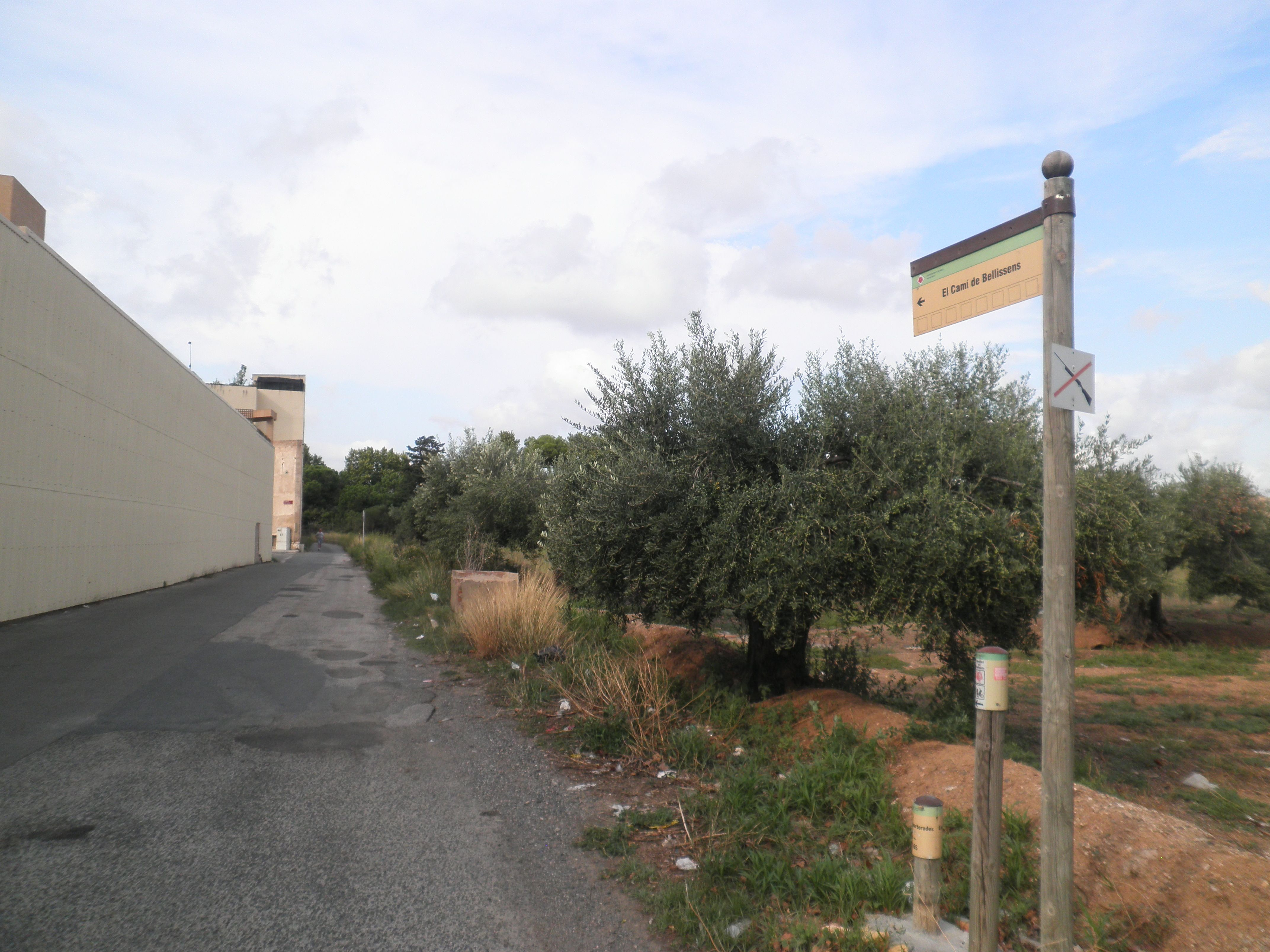 Indicador del Camí del Burgar vora la Carretera de Salou, a Reus